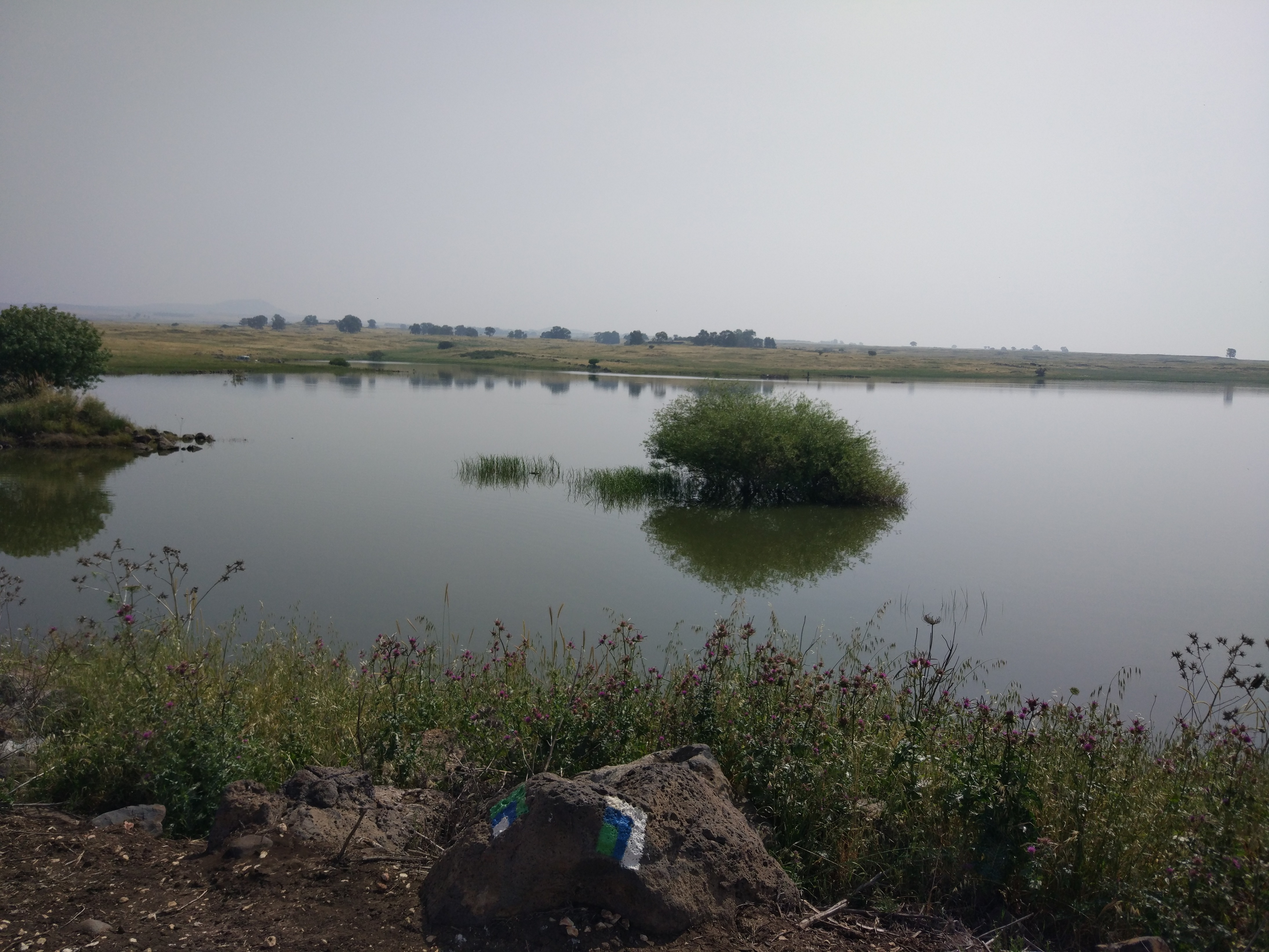 מאגר דליות ברמת הגולן, אפריל 2017